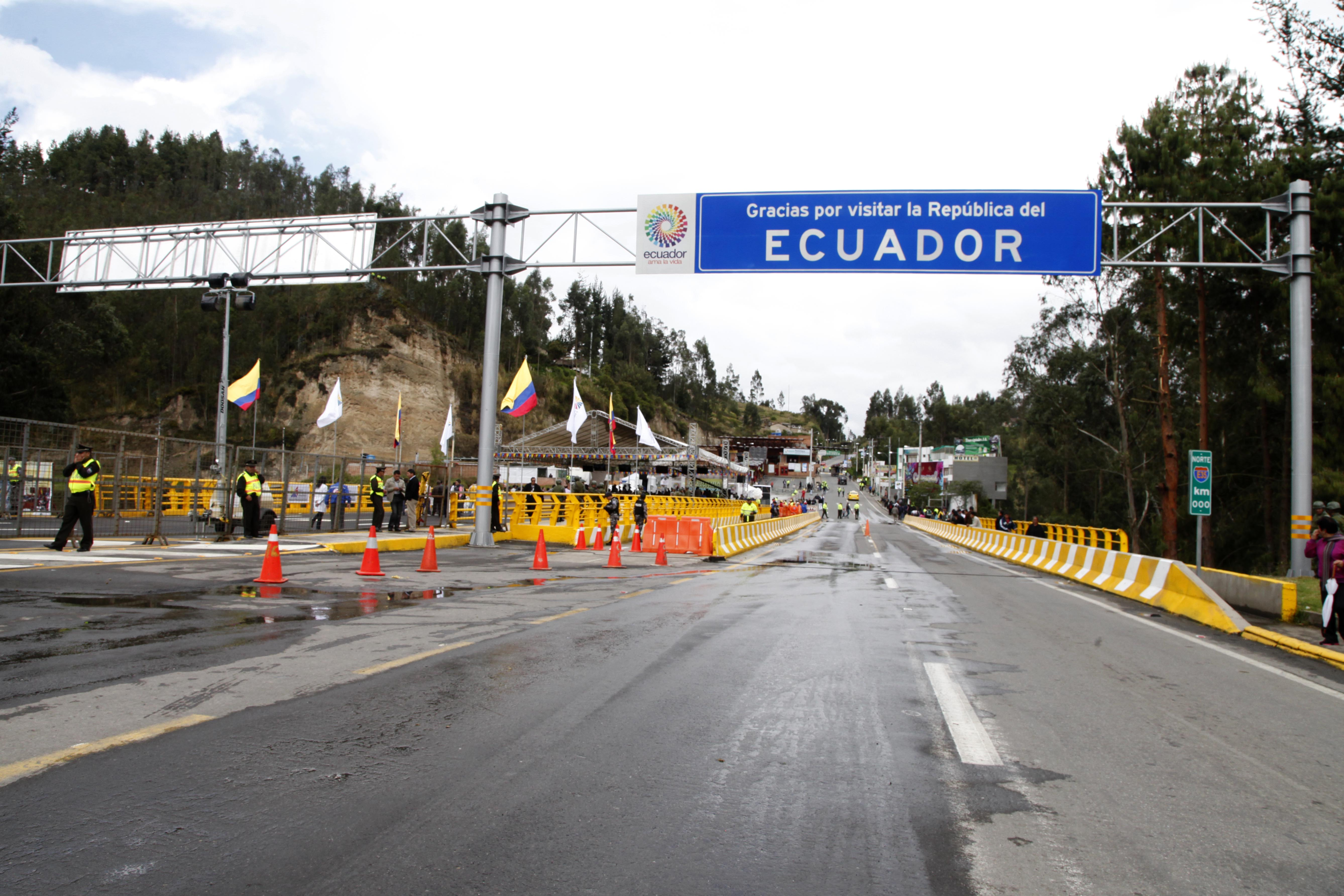 Ipiales (Colombia), 25 de Noviembre 2013. En el Encuentro Presidencial y II Reunión del Gabinete Binacional de Ministros Colombia - Ecuador se realizó la apertura del nuevo puente internacional de Rumichaca. Participaron en el evento el señor Presidente de la República del Ecuador, Rafael Correa y el Presidente de la República de Colombia Juan Manuel Santos, junto a las delegaciones oficiales de cada país. Foto: Xavier Granja Cedeño - Cancillería Ecuador